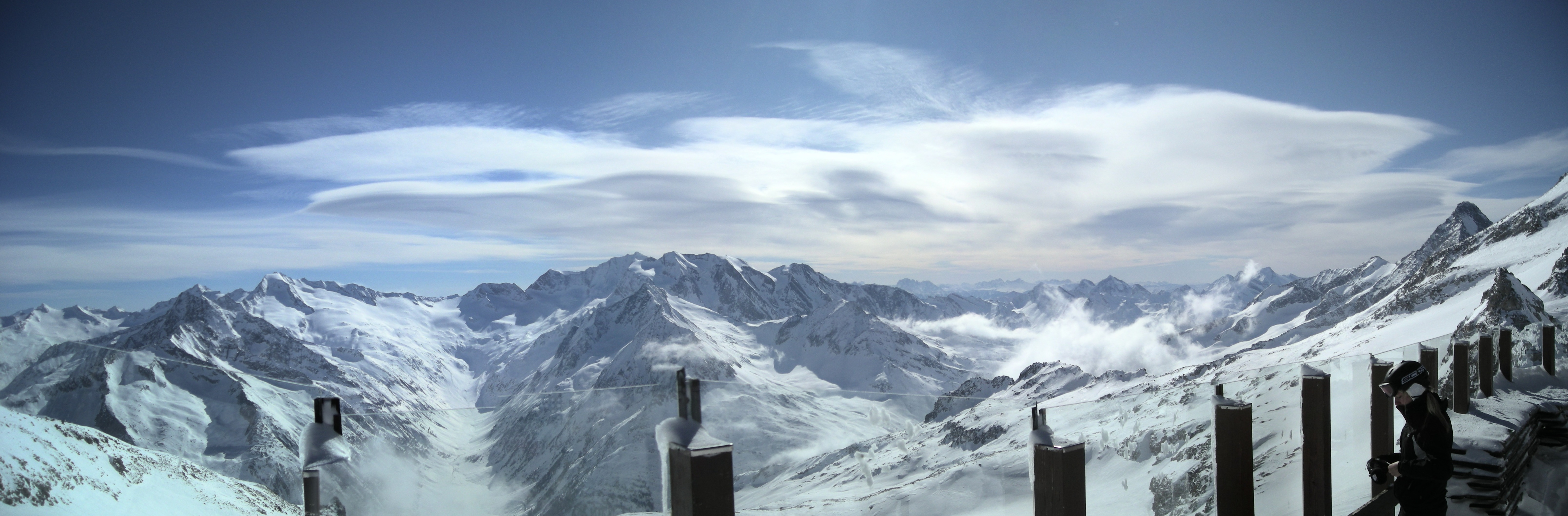 Bild von der Gletscherhütte des Hintertuxer Gletschers